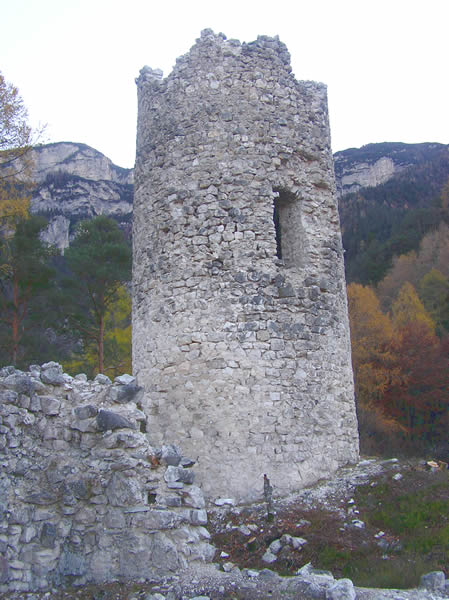 Castel San Pietro, Torre cilindrica. Foto personale - novembre 2005 Copyright (c) 2005 Luca Marcolla.